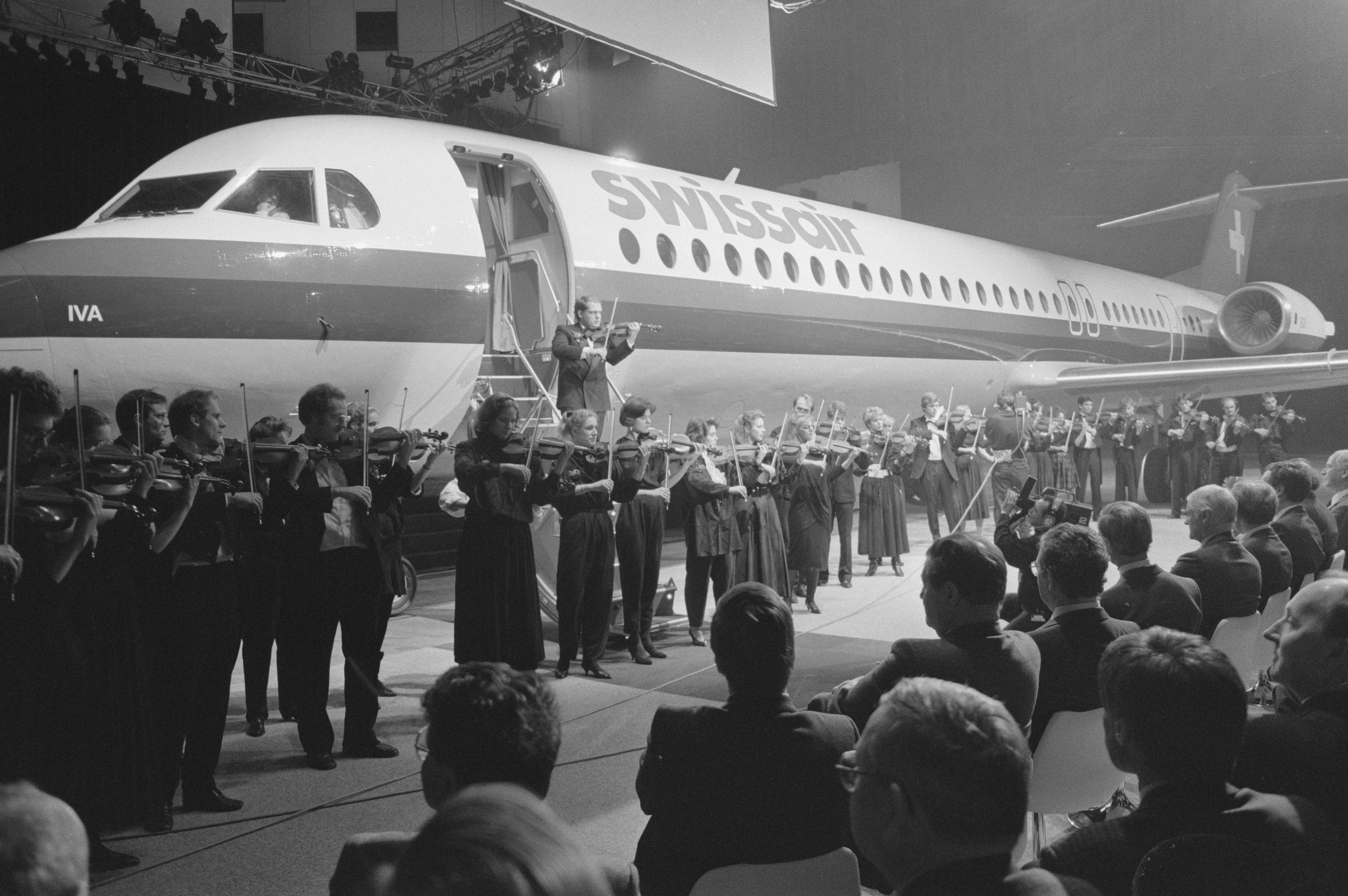 Collectie / Archief : Fotocollectie Anefo Reportage / Serie : [ onbekend ] Beschrijving : Overdracht 1e Fokker-100 aan Swissair; violist Jaap van Zweden op de trap van de Fokker Datum : 29 februari 1988 Trefwoorden : Overdrachten, trappen, violisten, vliegtuigen Persoonsnaam : Fokker 100, Jaap van Zweden Fotograaf : Croes, Rob C. / Anefo Auteursrechthebbende : Nationaal Archief Materiaalsoort : Negatief (zwart/wit) Nummer archiefinventaris : bekijk toegang 2.24.01.05 Bestanddeelnummer : 934-1989